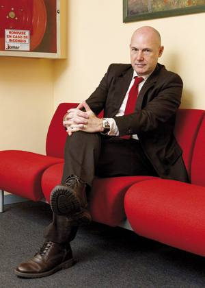 Iñigo Lamarcaren argazkia 2012an